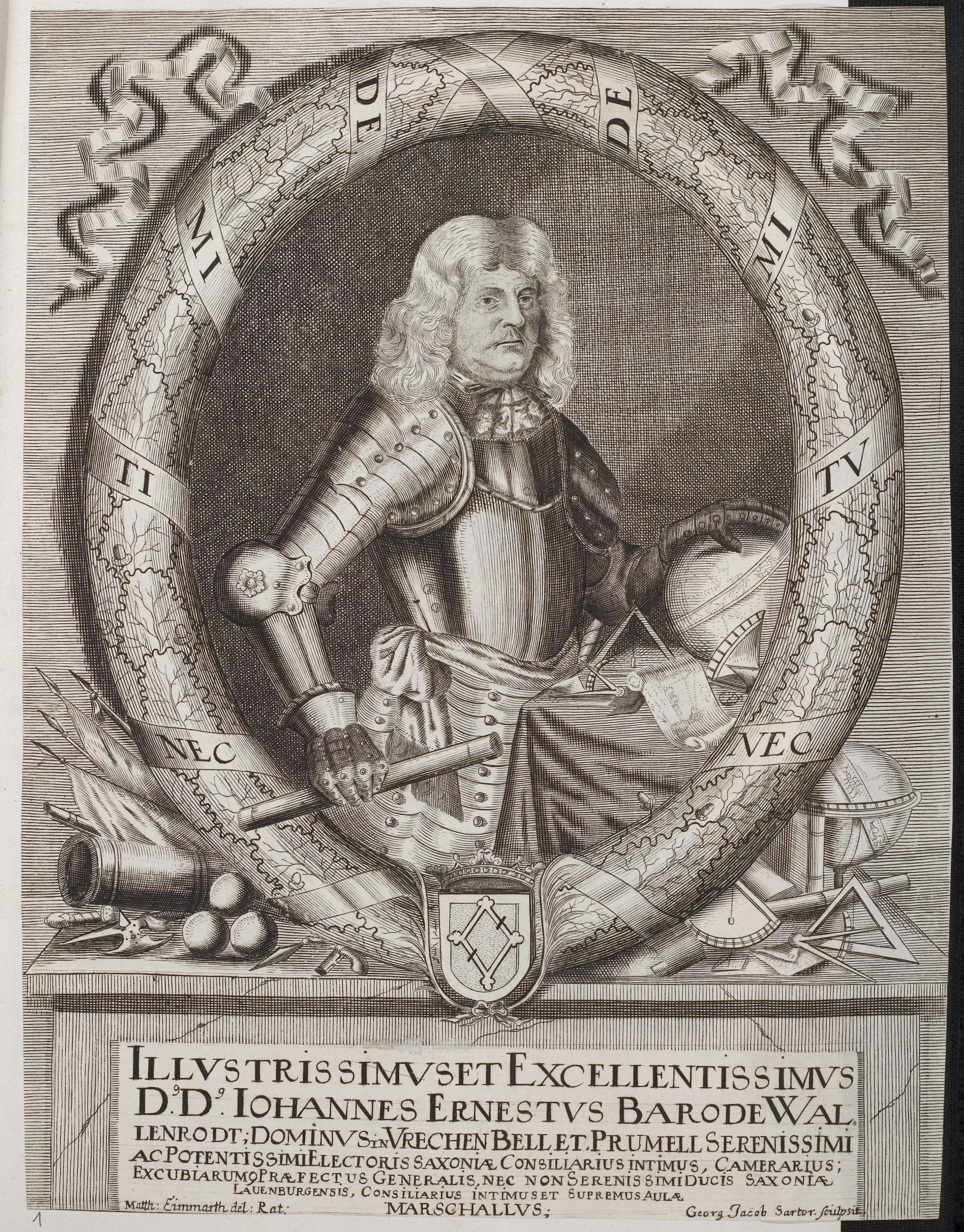 Grafik aus dem Klebeband Nr. 2 der Fürstlich Waldeckschen Hofbibliothek Arolsen Motiv: Johann Ernst von Wallenrodt, Verwaltungsbeamter im Herzogtum Preußen